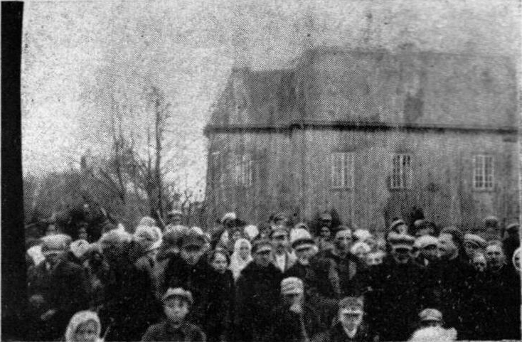 Беларуская (тарашкевіца): Дакудаў (Dakudaŭ). Царква Сьвятой Параскевы Пятніцы